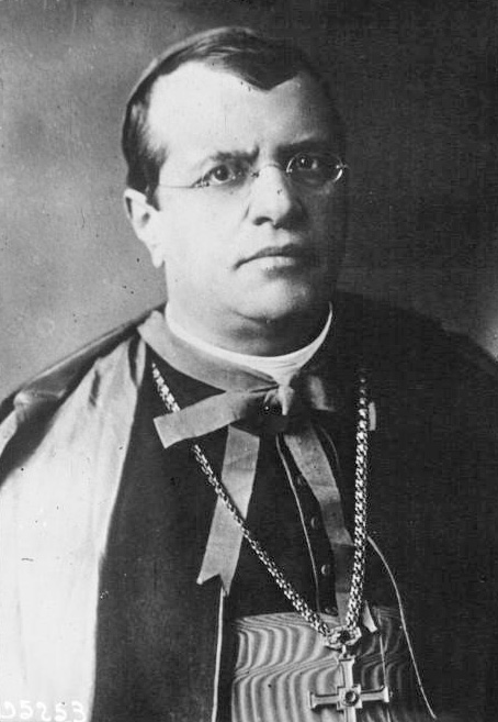 Cardinal Lualdi (photographie de presse)